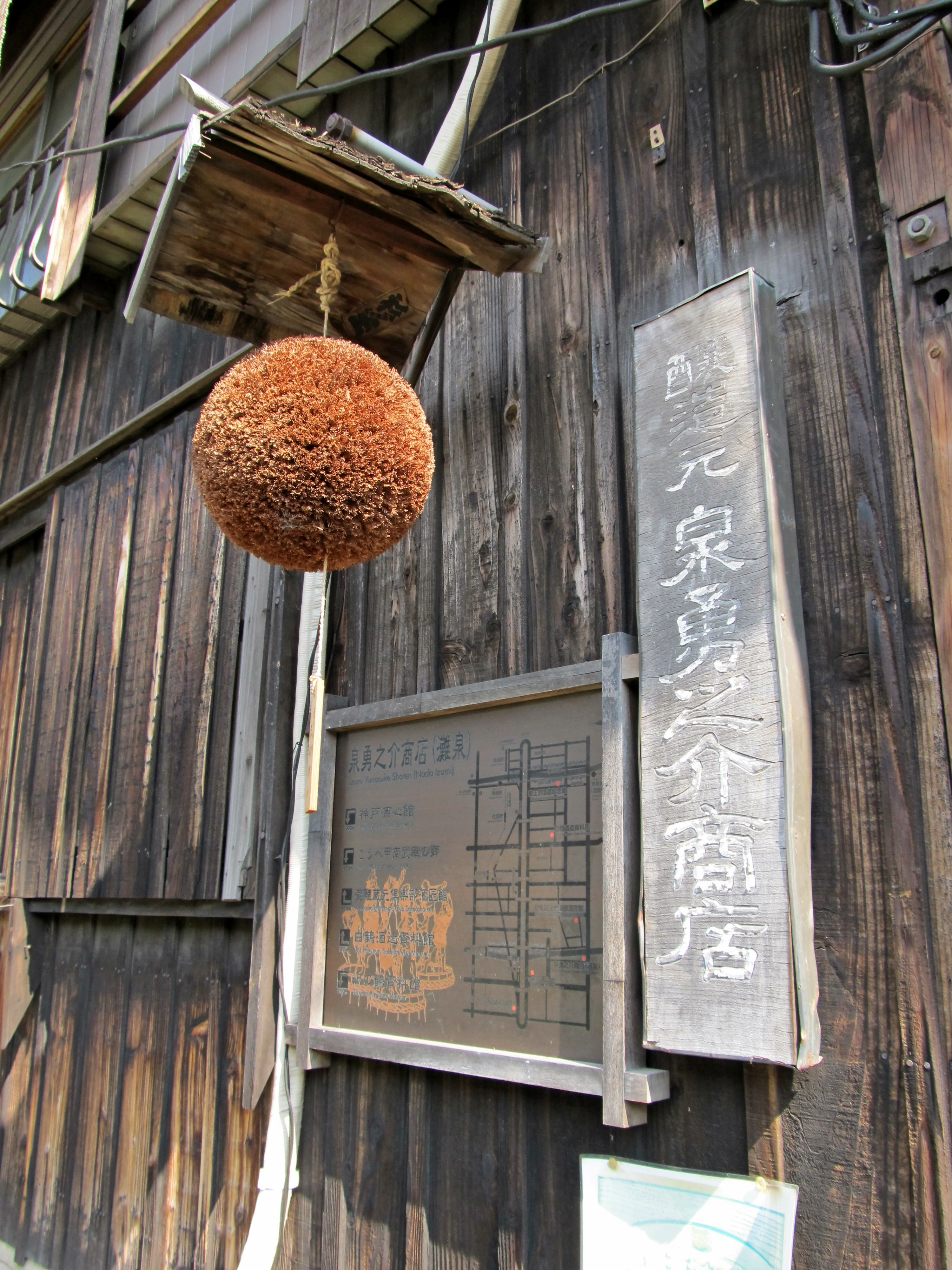 泉勇之介商店。灘五郷唯一の木造酒蔵をもつ造り酒屋。国の登録有形文化財。所在地は兵庫県神戸市東灘区御影塚町1丁目。